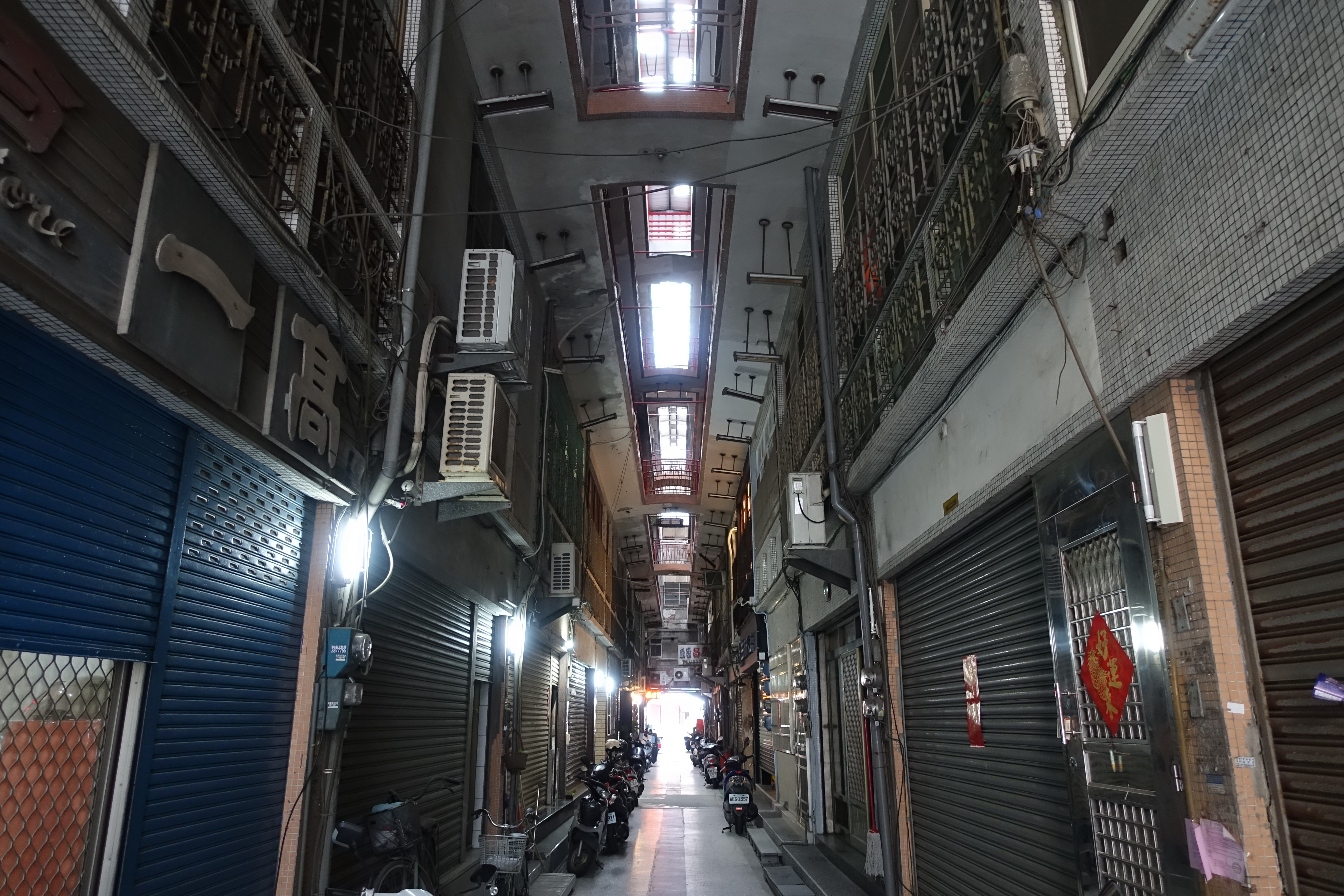 中文（台灣）: 高雄國際商場(原高雄銀座)內部的拱廊街